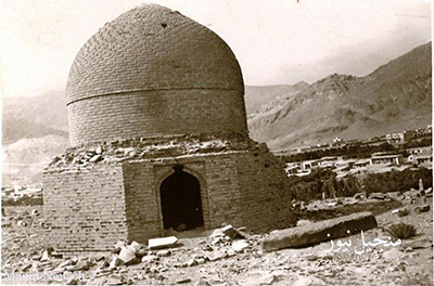 زرین تاج - شریف منجیلی دلیر گنبد